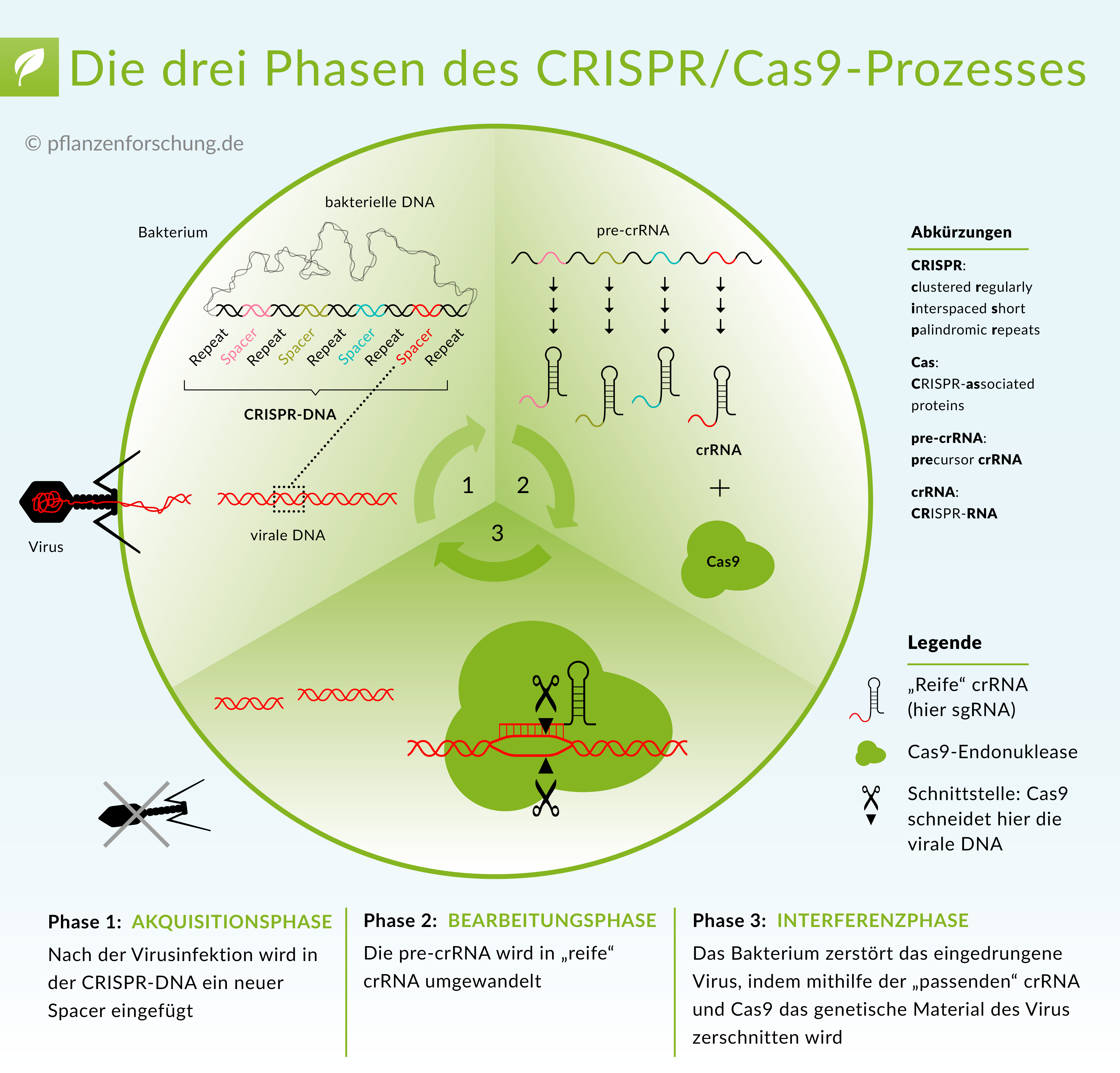 Überblick der drei Phasen des CRISPR/Cas9-Prozesses (nach Doudna & Charpentier 2014, Science 346(6213))